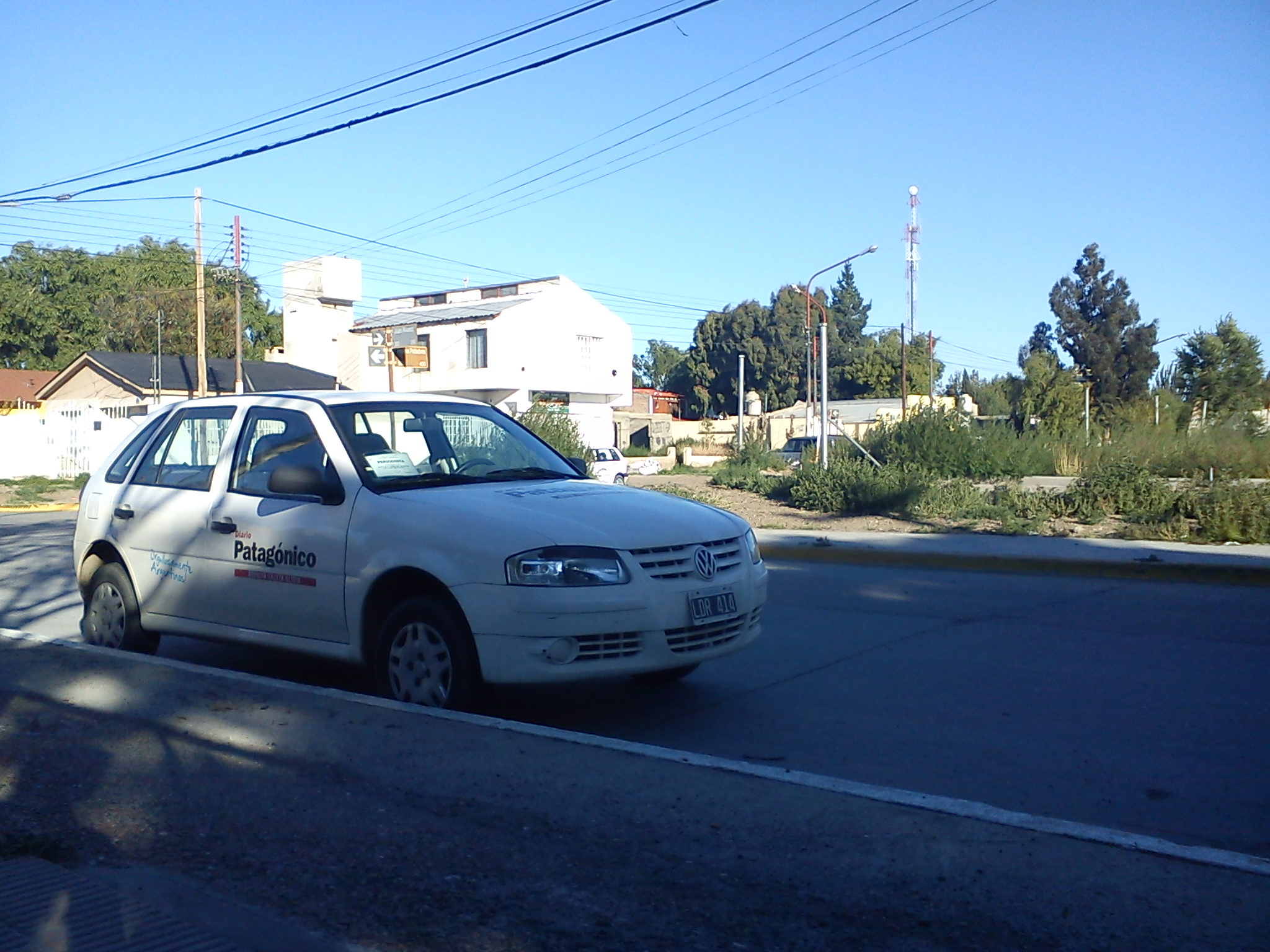 Movil de la Agencia Caleta Olivia, perteneciente a el Diario Patagónico